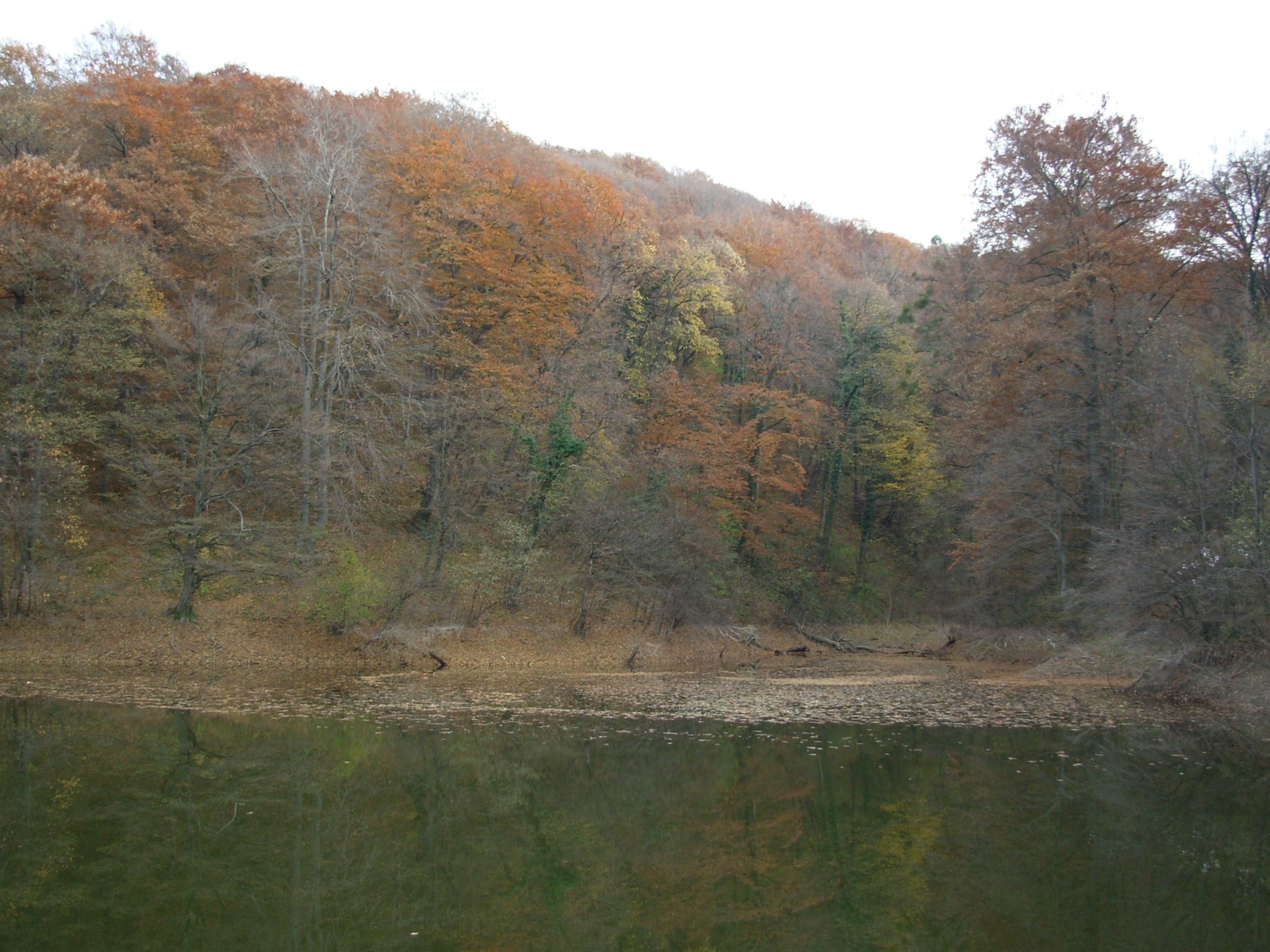 Lake of Popovica at Fruška Gora mountain, Vojvodina, Serbia.